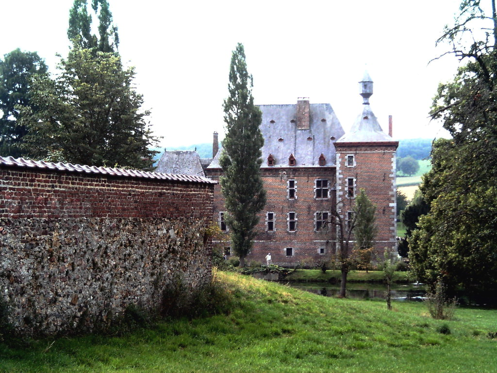 Limburgs: Kesjtièl van St. Pietersvoere Foto:Els Diederen 2006 Aelske